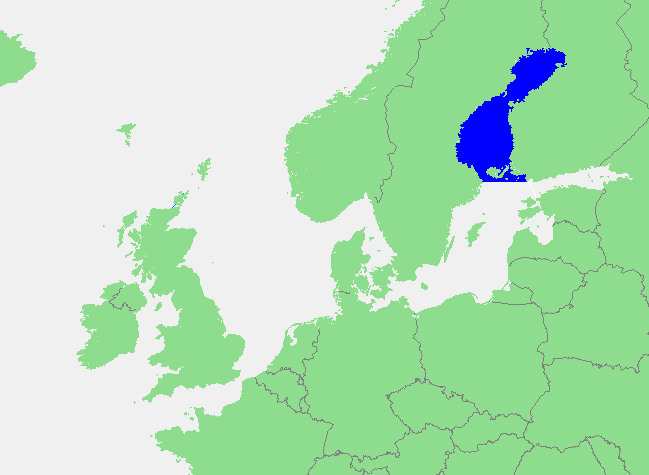 Botnische Golf